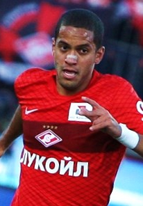 Rômulo Borges Monteiro